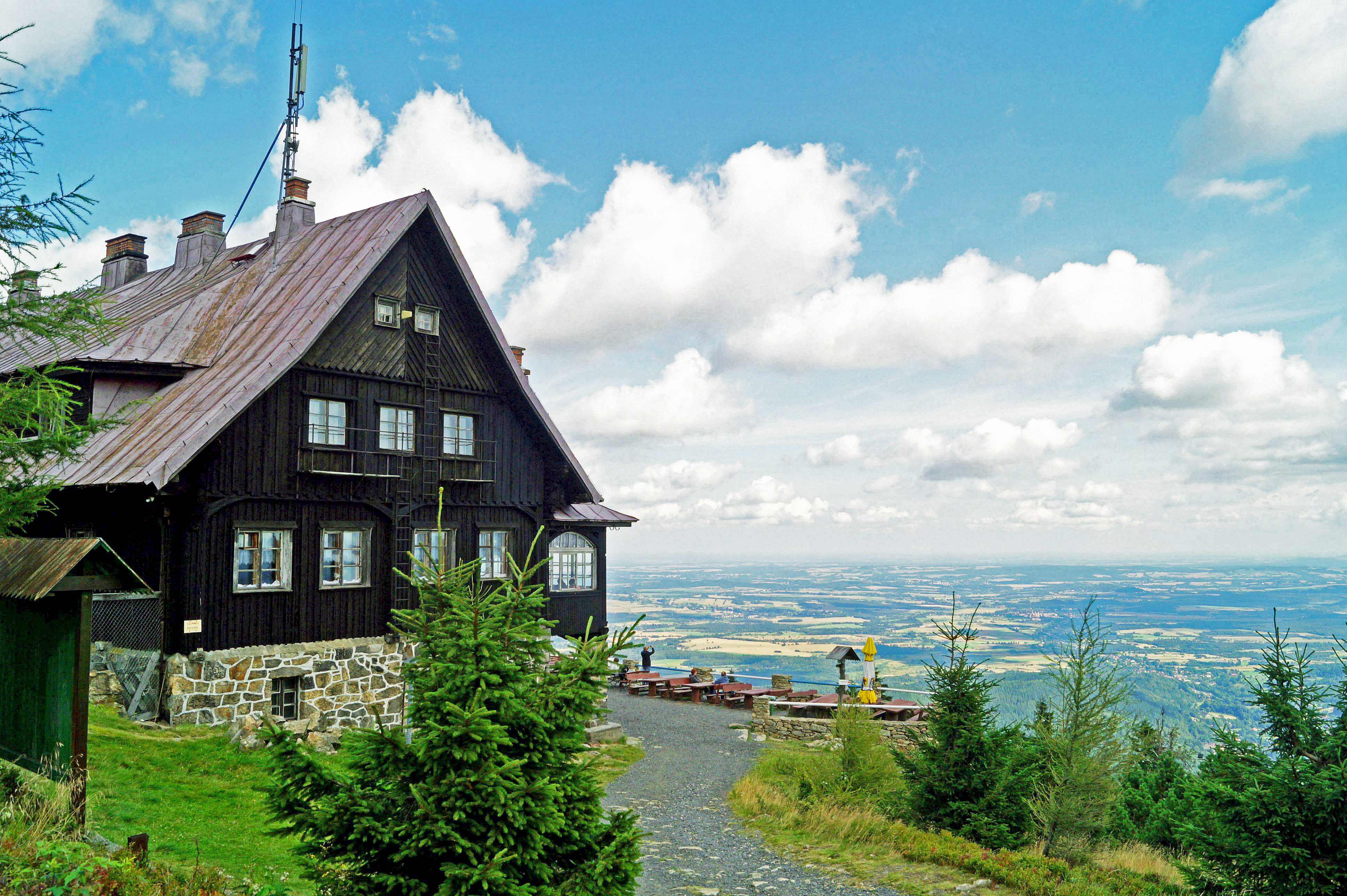 Obszar specjalnej ochrony ptaków Góry Izerskie.